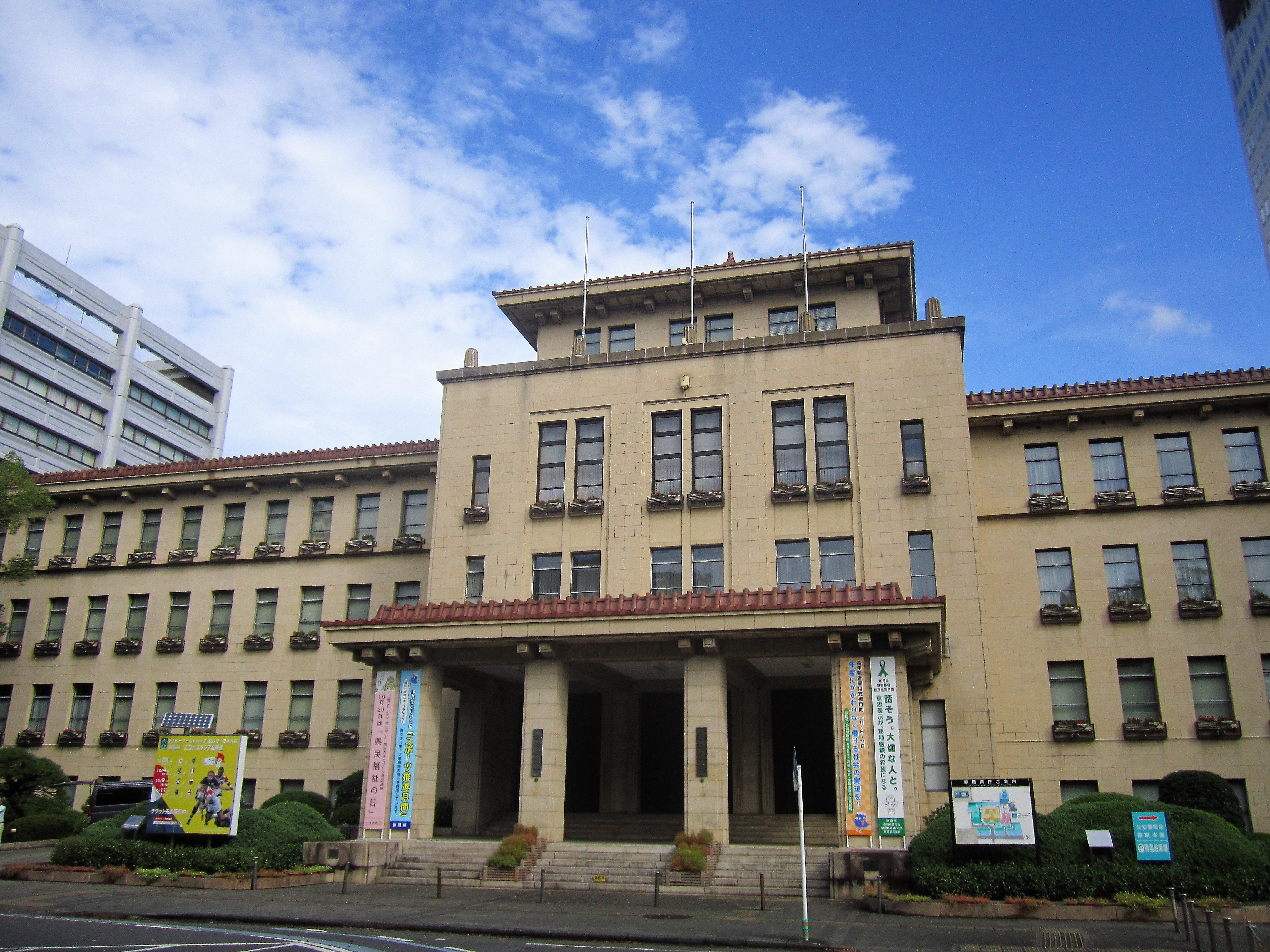 静岡県庁舎本館